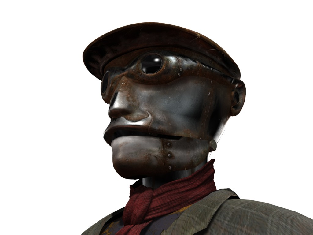 Capture d'écran du jeu vidéo Syberia (2002), développé et édité par Microïds. Oscar, l'automate conducteur de train, personnage secondaire qui accompagne l'héroïne Kate Walker pendant la plus grande partie du jeu.